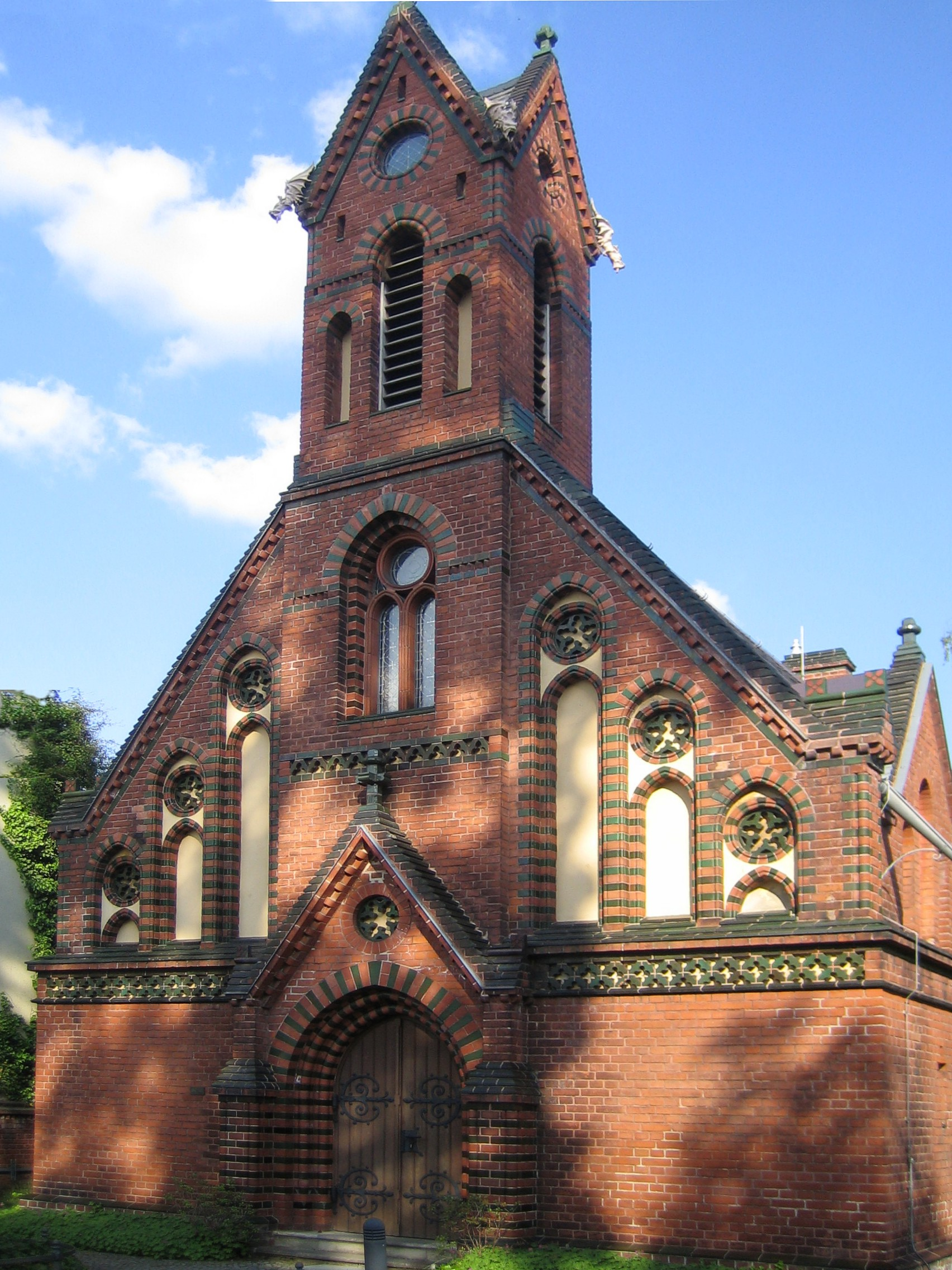 Klein-Glienicke bei Berlin. Neugotische evangelische Kapelle von 1880.